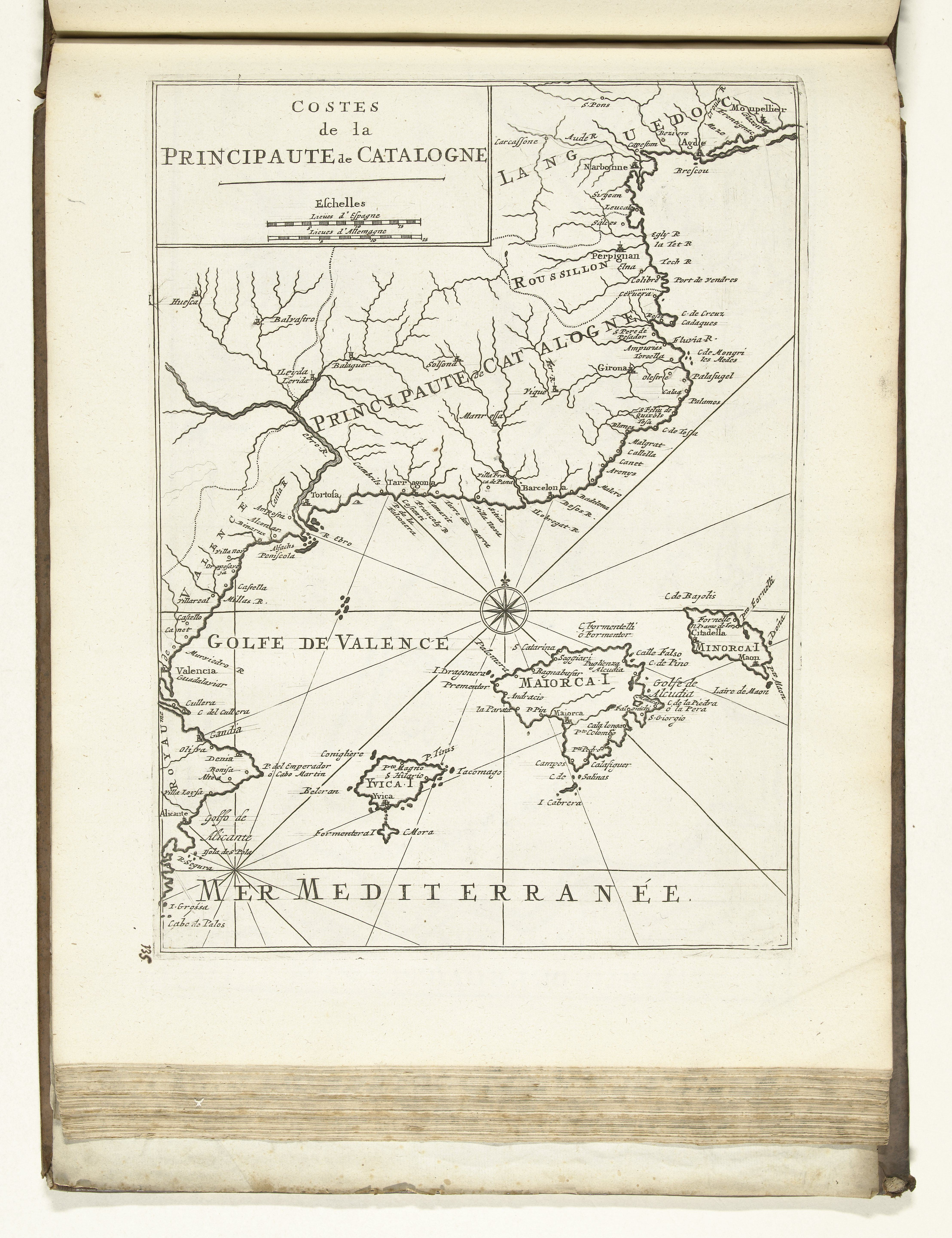 IdentificatieTitel(s): Kaart van de Catalaanse kust, 1726Costes de la Principaute de Catalogne (titel op object)Les Forces de l'Europe, Asie, Afrique et Amerique (...) Comme aussi les Cartes des Côtes de France et d'Espagne (serietitel op object)Objecttype: prent kaart Serienummer: 135/238Objectnummer: RP-P-OB-83.035-136Catalogusreferentie: FMH 3034-c[I]/135Omschrijving: Kaart van de Catalaanse kust met de Balearen. Plaat nr. 135 in deel VI van het prentwerk: Les Forces de l'Europe, Asie, Afrique et Amerique ... Comme aussi les Cartes des Côtes de France et d'Espagne uit 1726, dit eerste deel met 238 met de hand genummerde platen van vermaarde sterke steden en vestingen in het kader van de Spaanse Successieoorlog 1701-1713. Voor het merendeel zijn deze platen gekopieerd naar de anonieme Franse platen van vermaarde sterke steden en vestingen: in Les forces de l'Europe en in: Le theatre de la guerre, dans les Pays-Bas, beide oorspronkelijk uitgegeven door Nicolas de Fer te Parijs (1693-1697) in het kader van de Negenjarige Oorlog. Titel en opschriften in het Frans.VervaardigingVervaardiger: prentmaker: anoniemuitgever: Pieter van der Aa (I)Plaats vervaardiging: prentmaker: Noordelijke Nederlandenuitgever: LeidenDatering: 1726Fysieke kenmerken: gravureMateriaal: papier Techniek: graveren (drukprocedé)Afmetingen: plaatrand: h 313 mm × b 228 mmOnderwerpWat: maps of separate countries or regionsSpaanse SuccessieoorlogWanneer: 1701 - 1713Waar: CataloniëBalearenVerwerving en rechtenVerwerving: aankoop 1881Copyright: Publiek domein